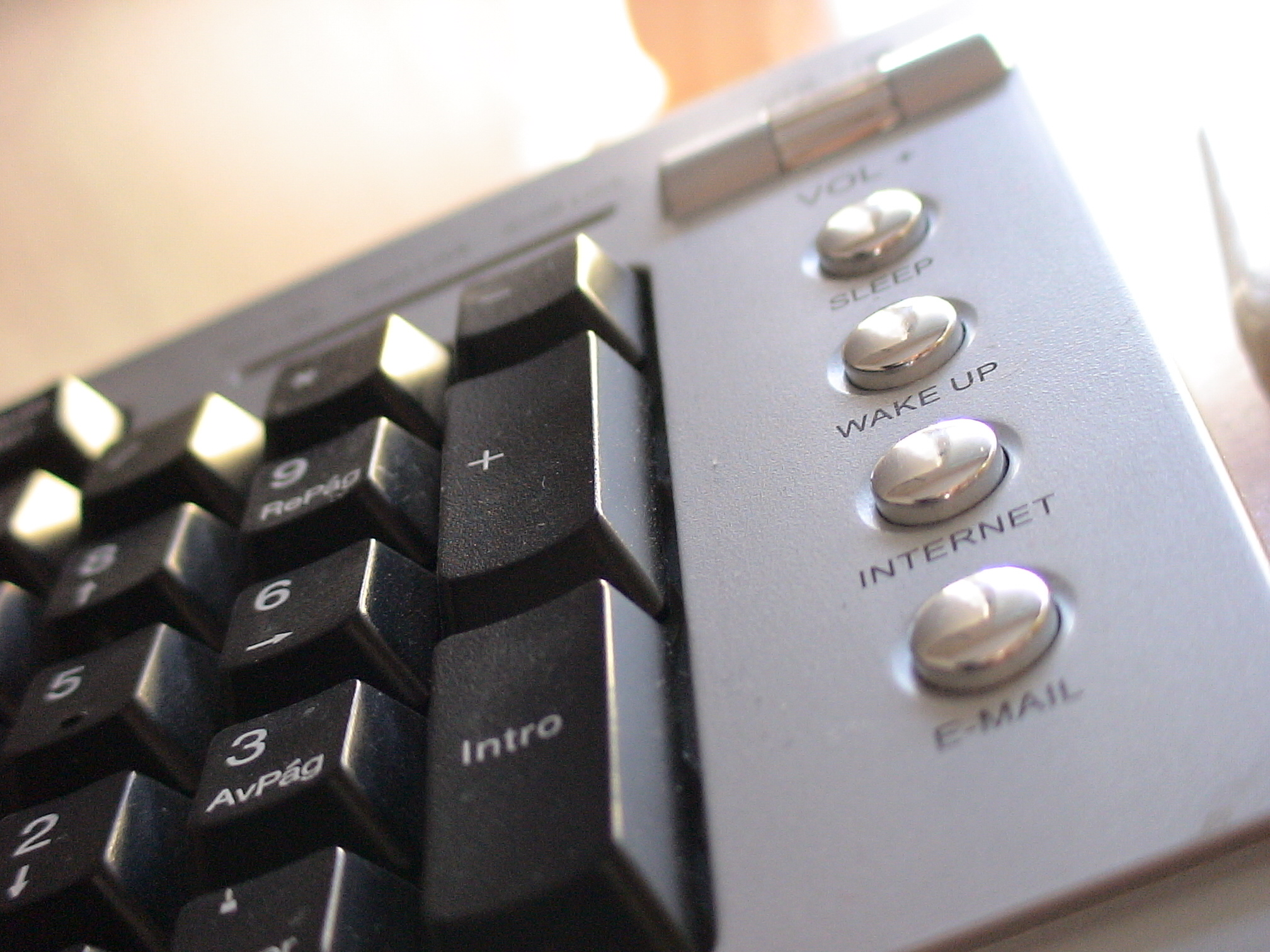 Multimedia keyboard